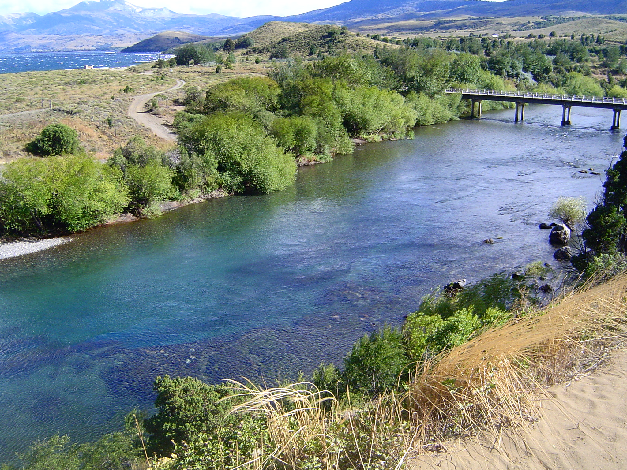 Naciente del río Chimehuin. Al fondo se observa el lago Huechulafquen.